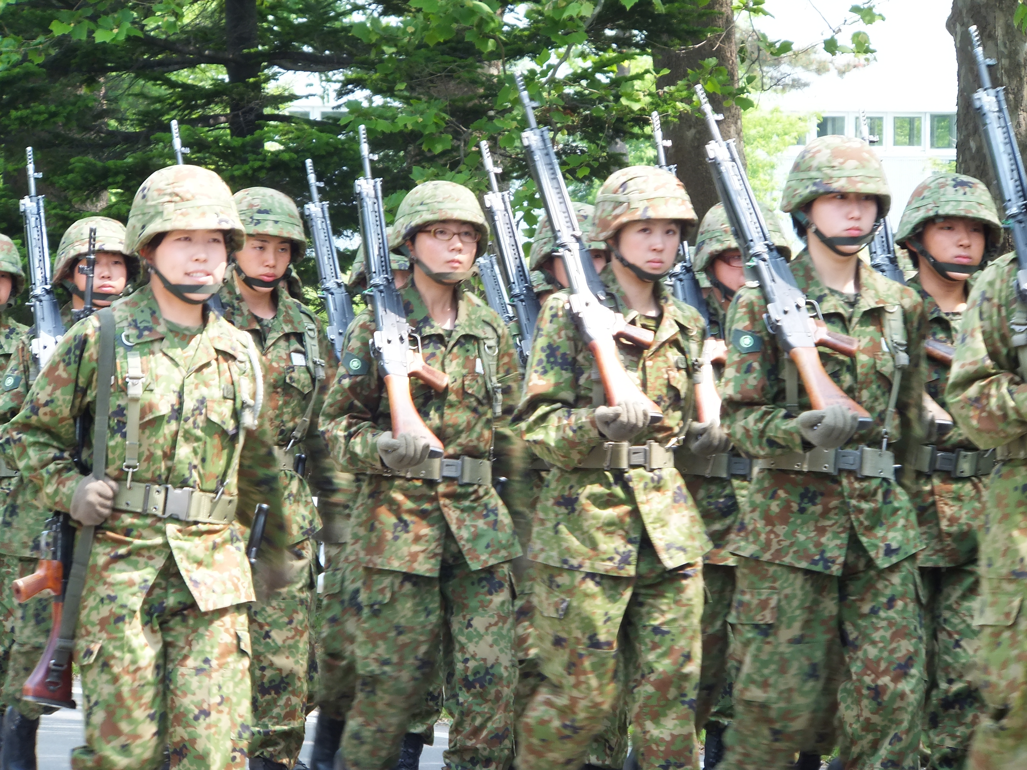 自衛官候補生記章を腕に縫い付けた新隊員前期教育中の隊員。